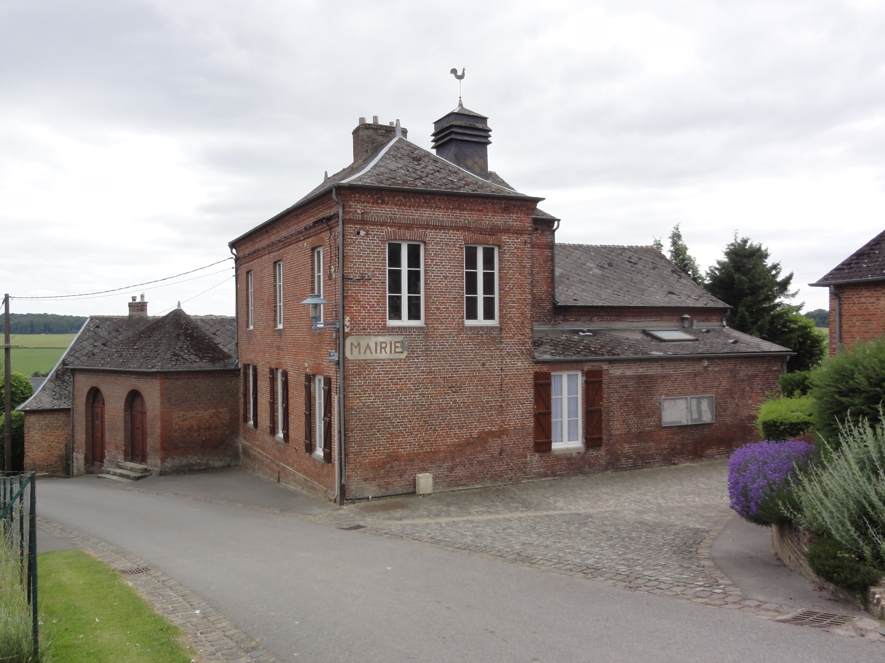 Harcigny (Aisne) mairie